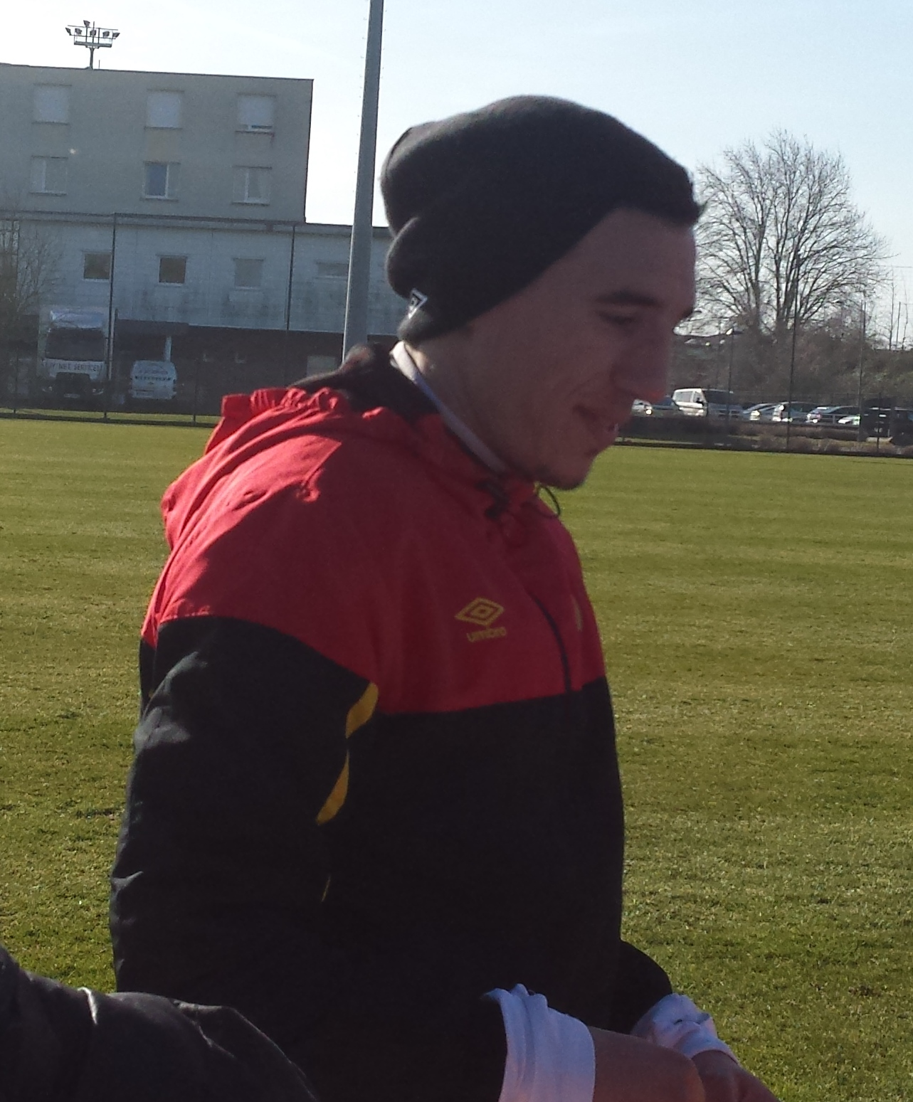 Alharbi El Jadeyaoui lors d'un entraînement public du Racing Club de Lens, le 5 mars 2015, sur le terrain San Siro du Centre technique et sportif de La Gaillette.